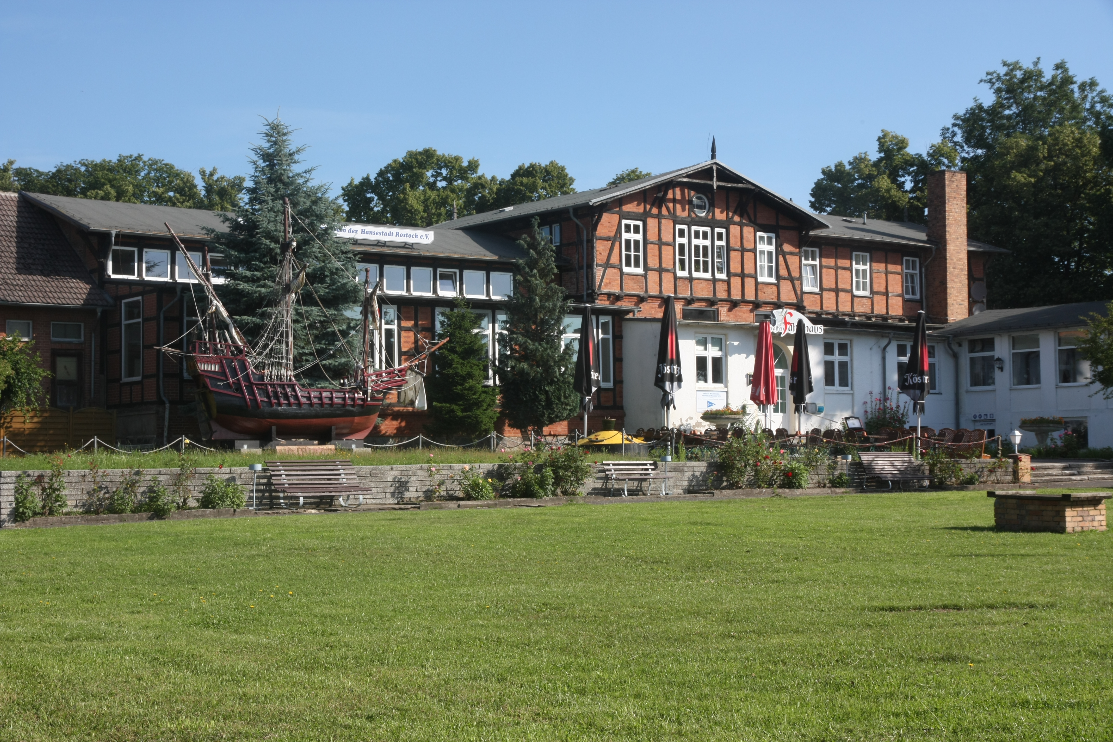 Fährberg 1, Rostock (Baudenkmal)